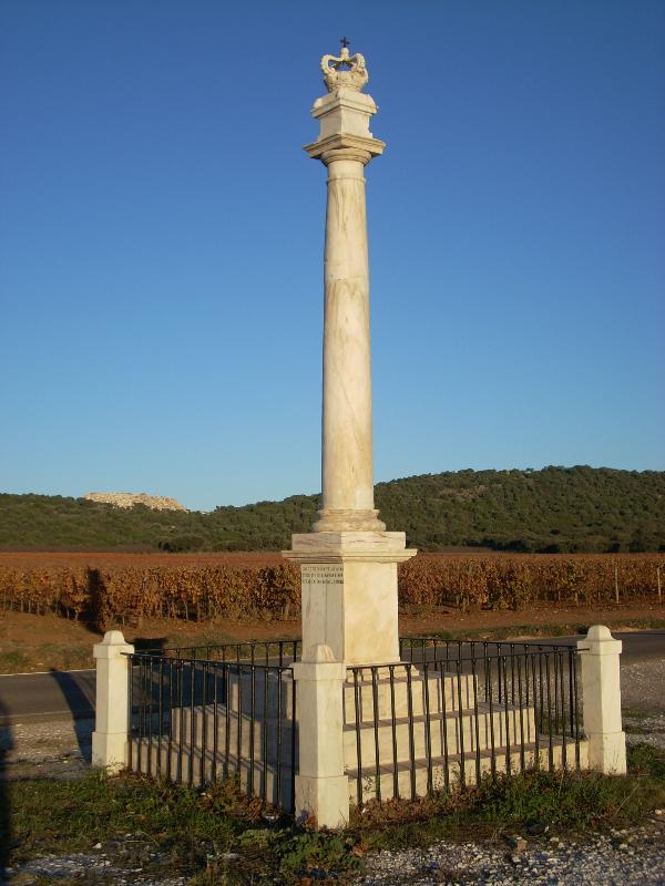 Montes Claros